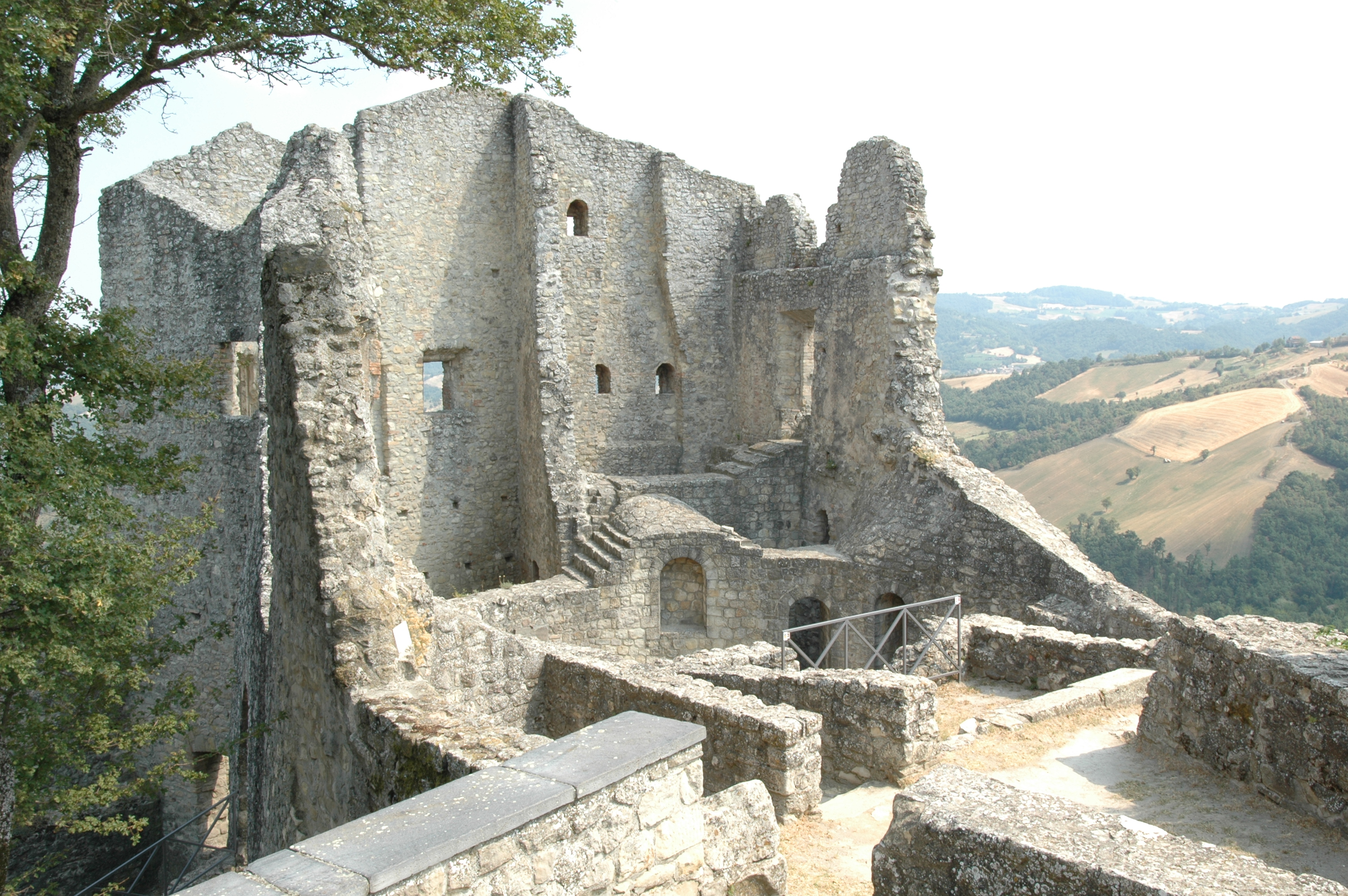 Castello di Canossa (RE)